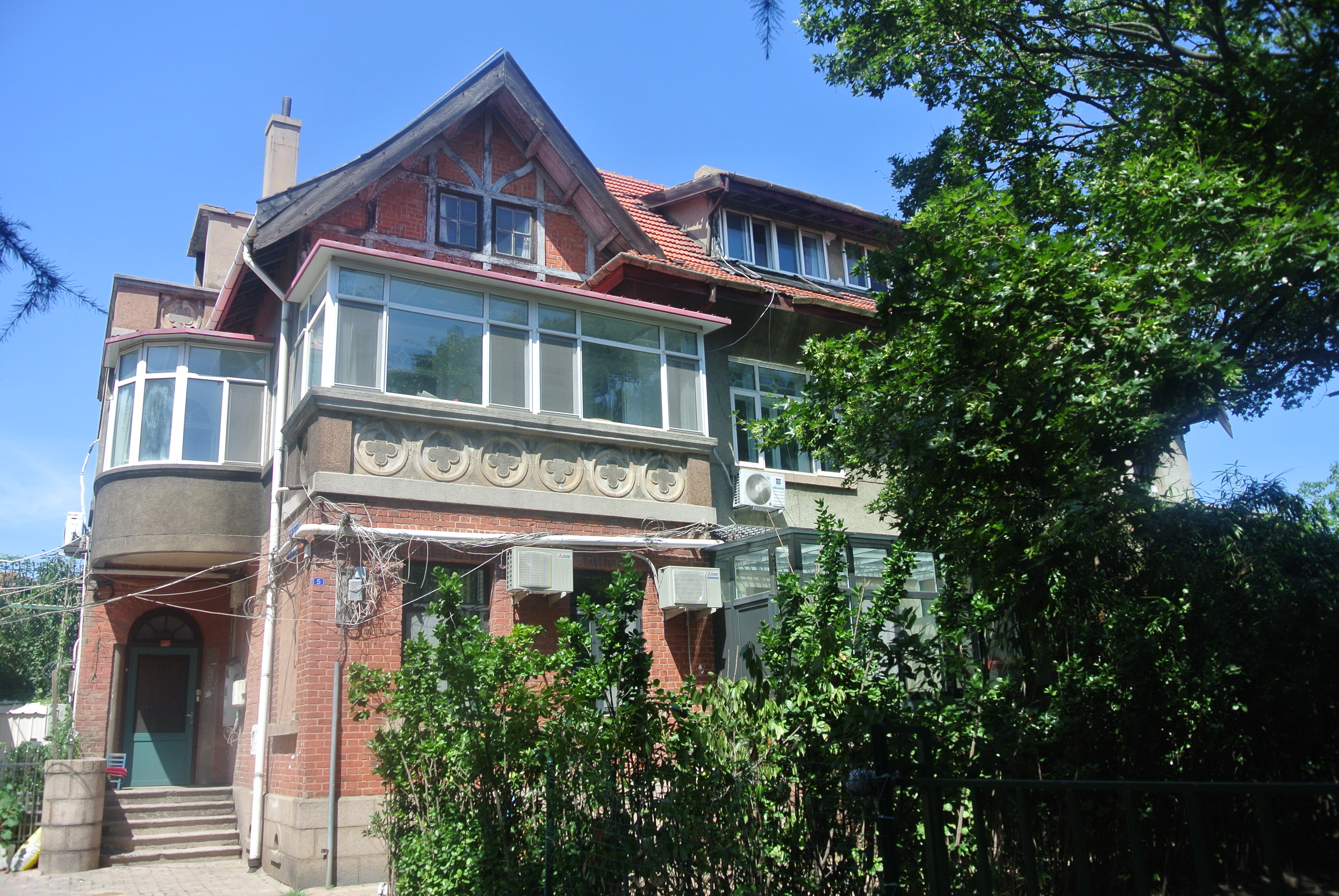 青岛坂井贞一旧宅旧址